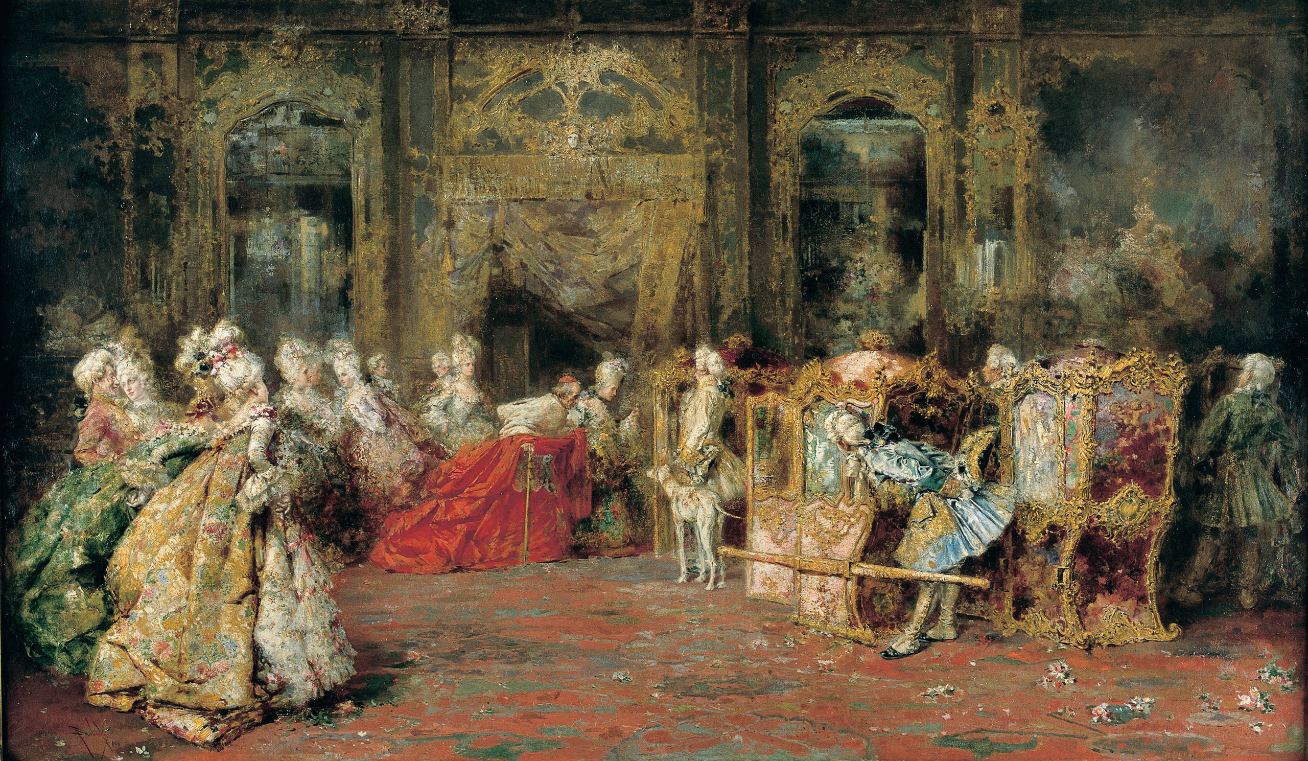 Salvador Sánchez Barbudo, Recepción de un cardenal. Siglo XIX. 70 x 120,5 cm, con marco: 99 x 148 x 9,5 cm, óleo sobre tela. Inv. 2009.